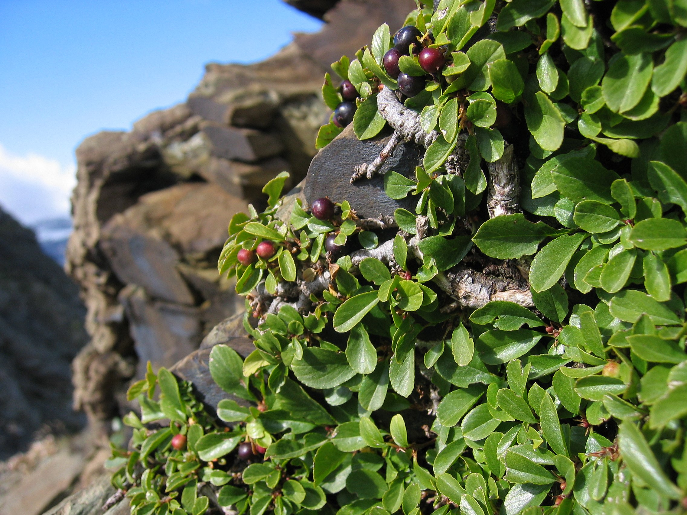 Rhamnus pumila, Near Summit of Piméné ~2700m, Pyrenees, France